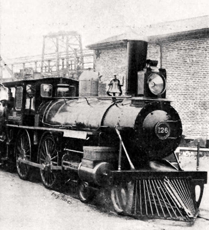 Locomotora n° 126 José Manuel Balmaceda de Ferrocarriles del Estado de Chile.